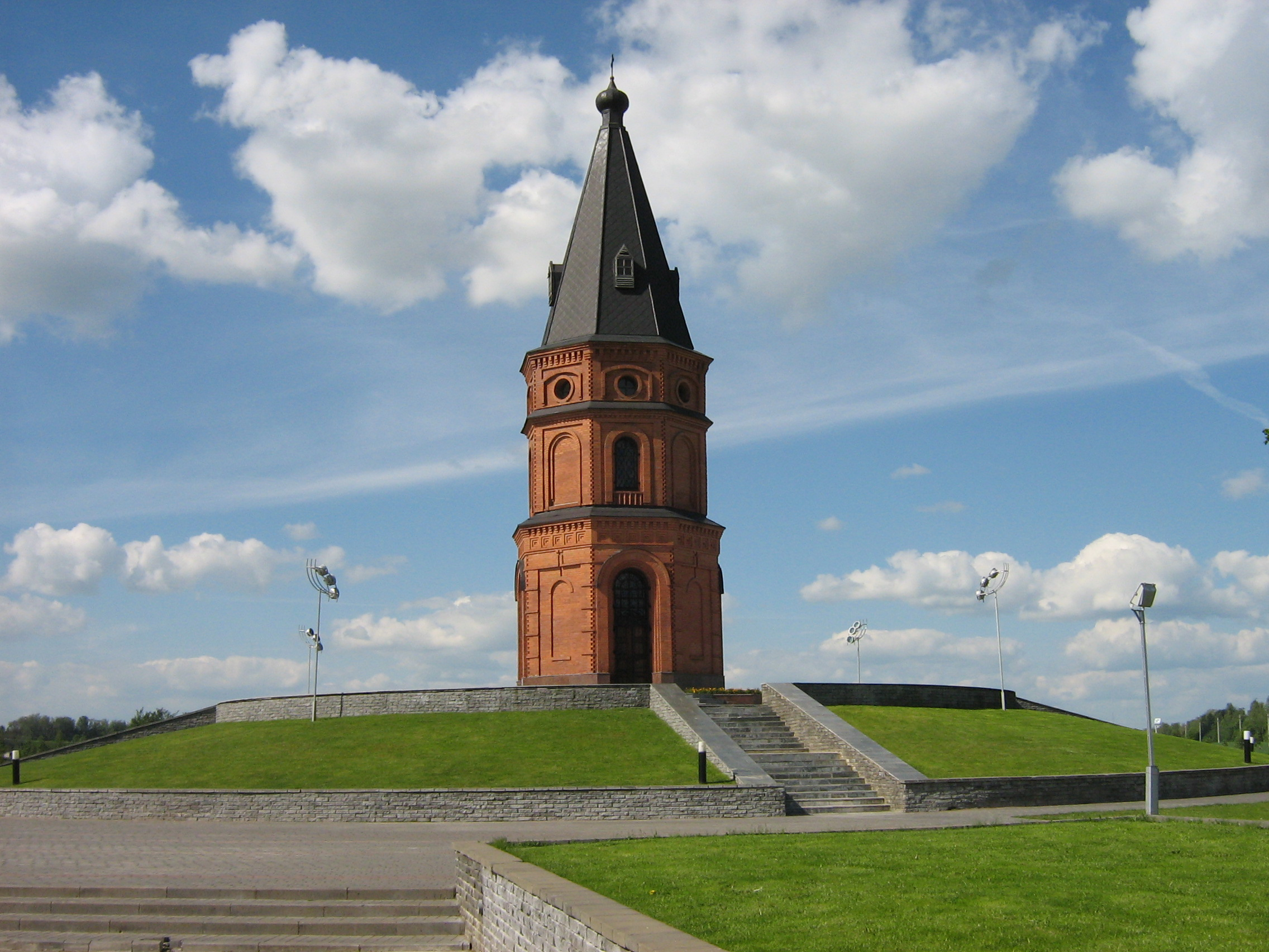 Мемориальный комплекс "Буйничское поле", место боев 1941 г.